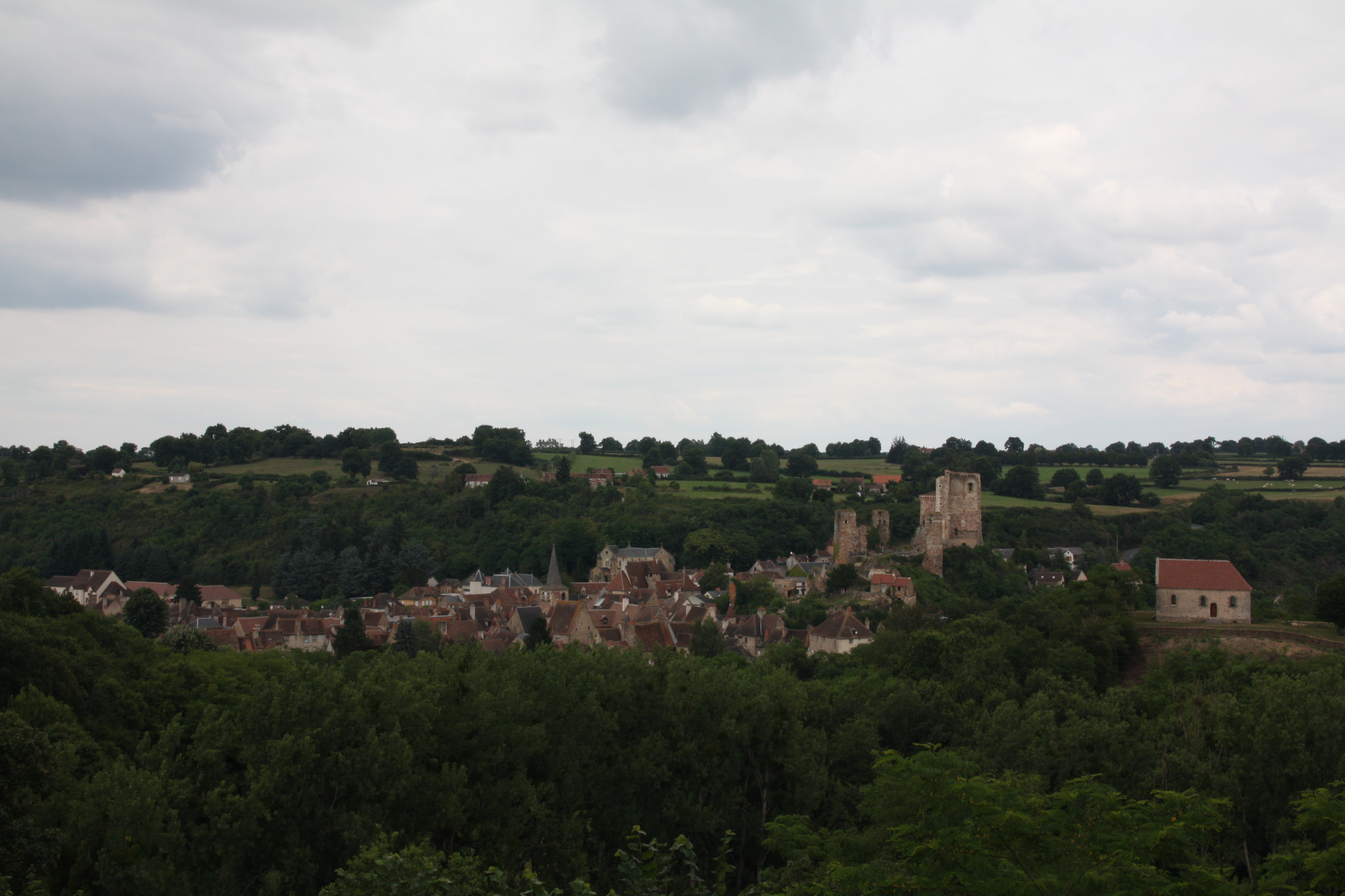 Hérisson, France